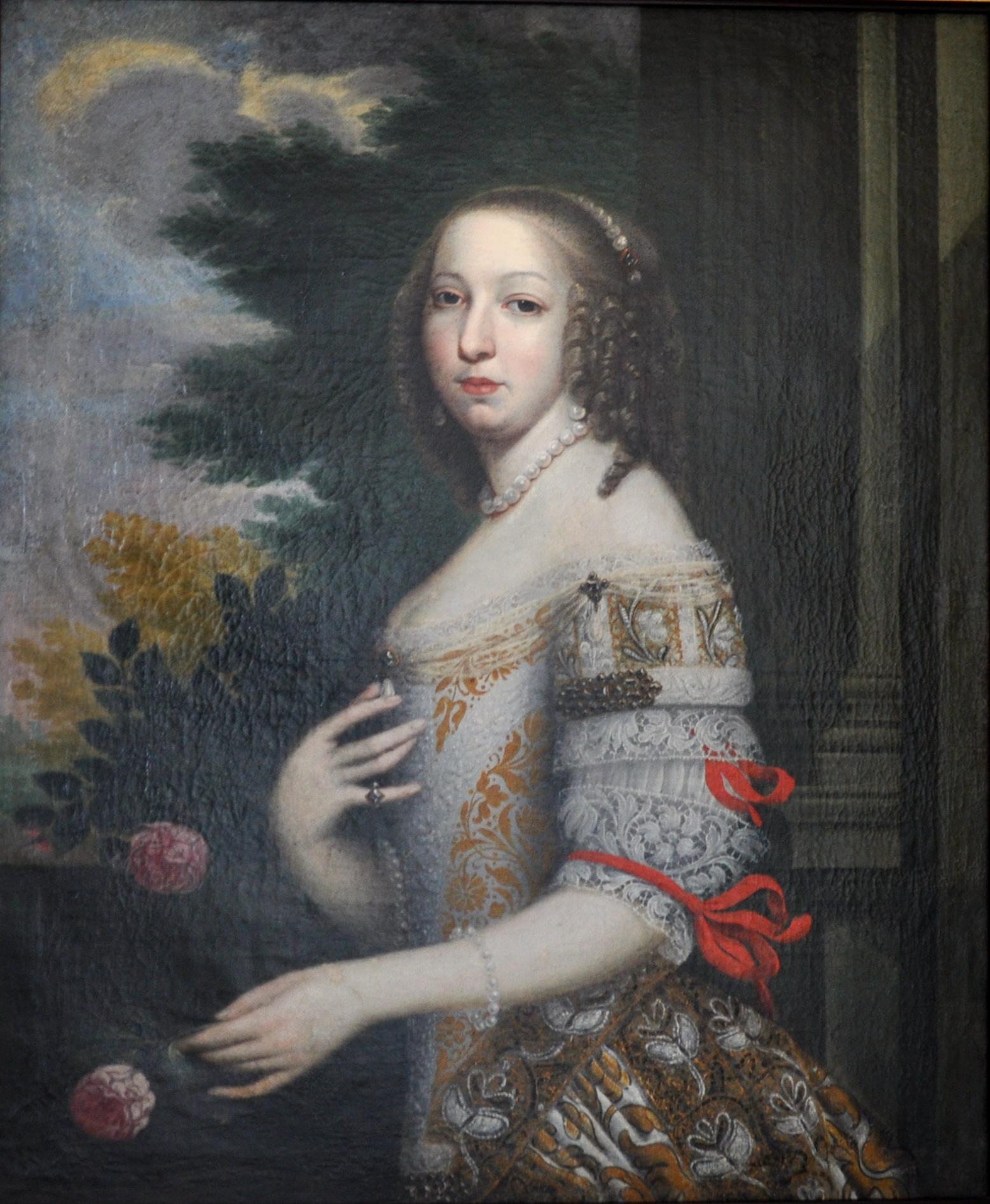 Burg Waldburg (Württemberg), Poträt Clara Isabella von Aremberg (Arenberg) (1630-1670), die zweite Ehefrau von Maximilian Willibald von Waldburg-Wolfegg